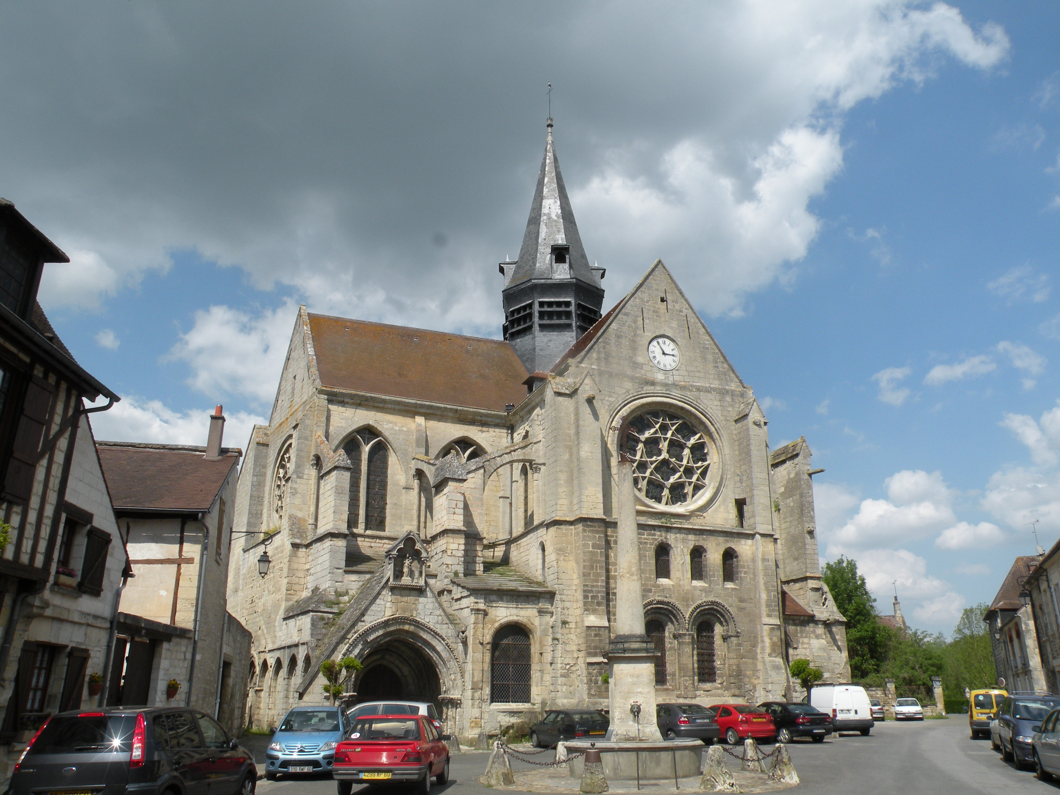 eglise de mello, oise, france